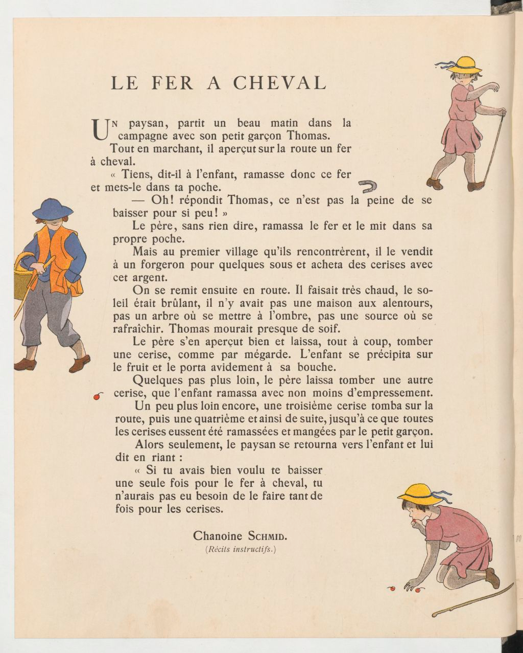 Contes et images, illustrations Marie-Madeleine Franc-Nohain : Le fer à cheval, Christoph von Schmid.